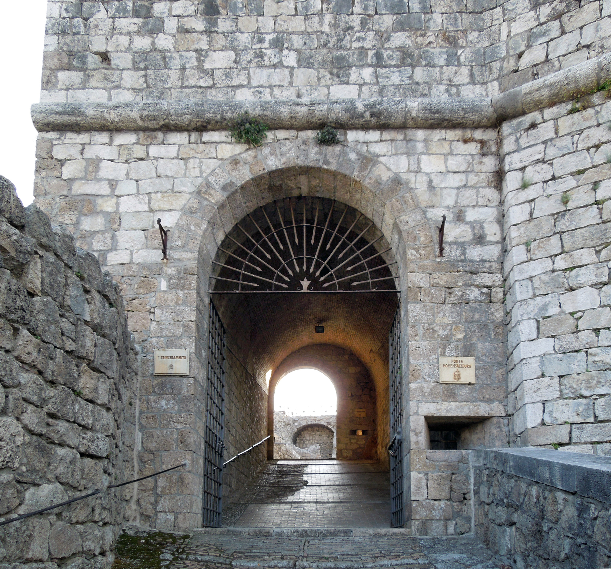 Porta Hohensalzburg, all'interno della Fortezza di Civitella del Tronto (TE). Un sentito ringraziamento al Dottor Fabio Bracchi, referente della gestione della Fortezza che, accordandomi il permesso, ha consentito lo scatto di questa immagine.